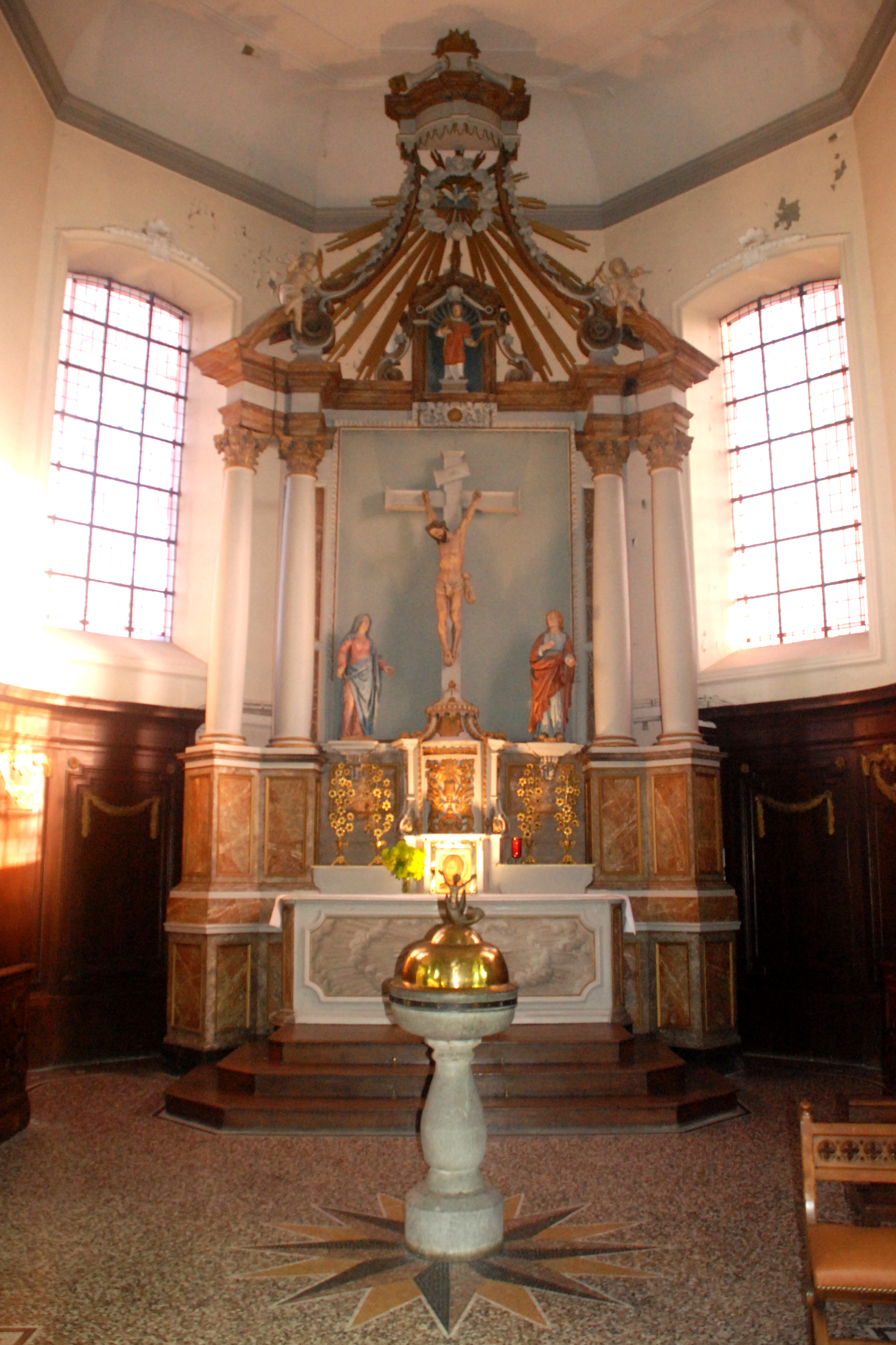 Belgique - Brabant wallon - Église de Court-Saint-Étienne